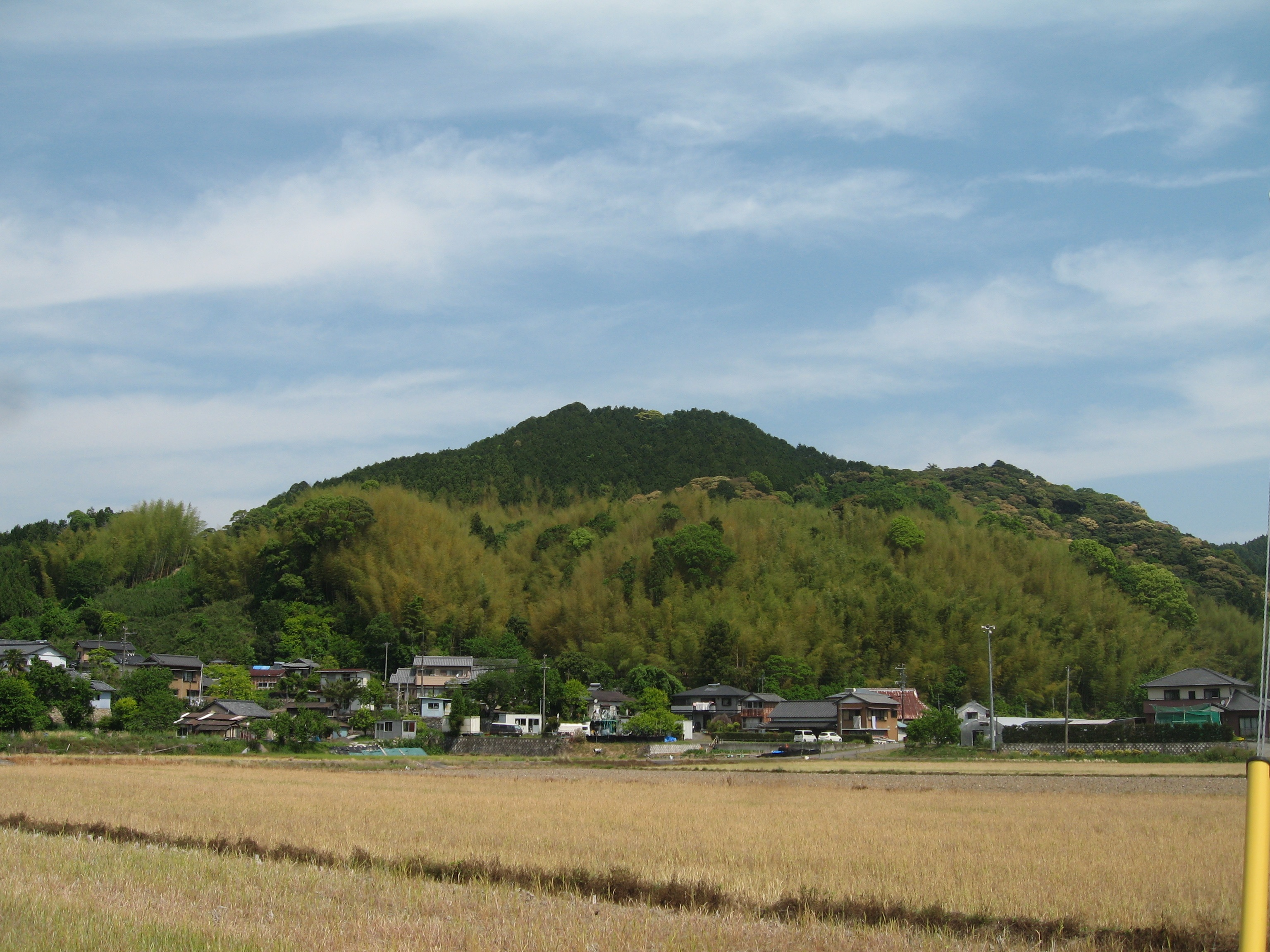 山麓から見た朝比奈城跡